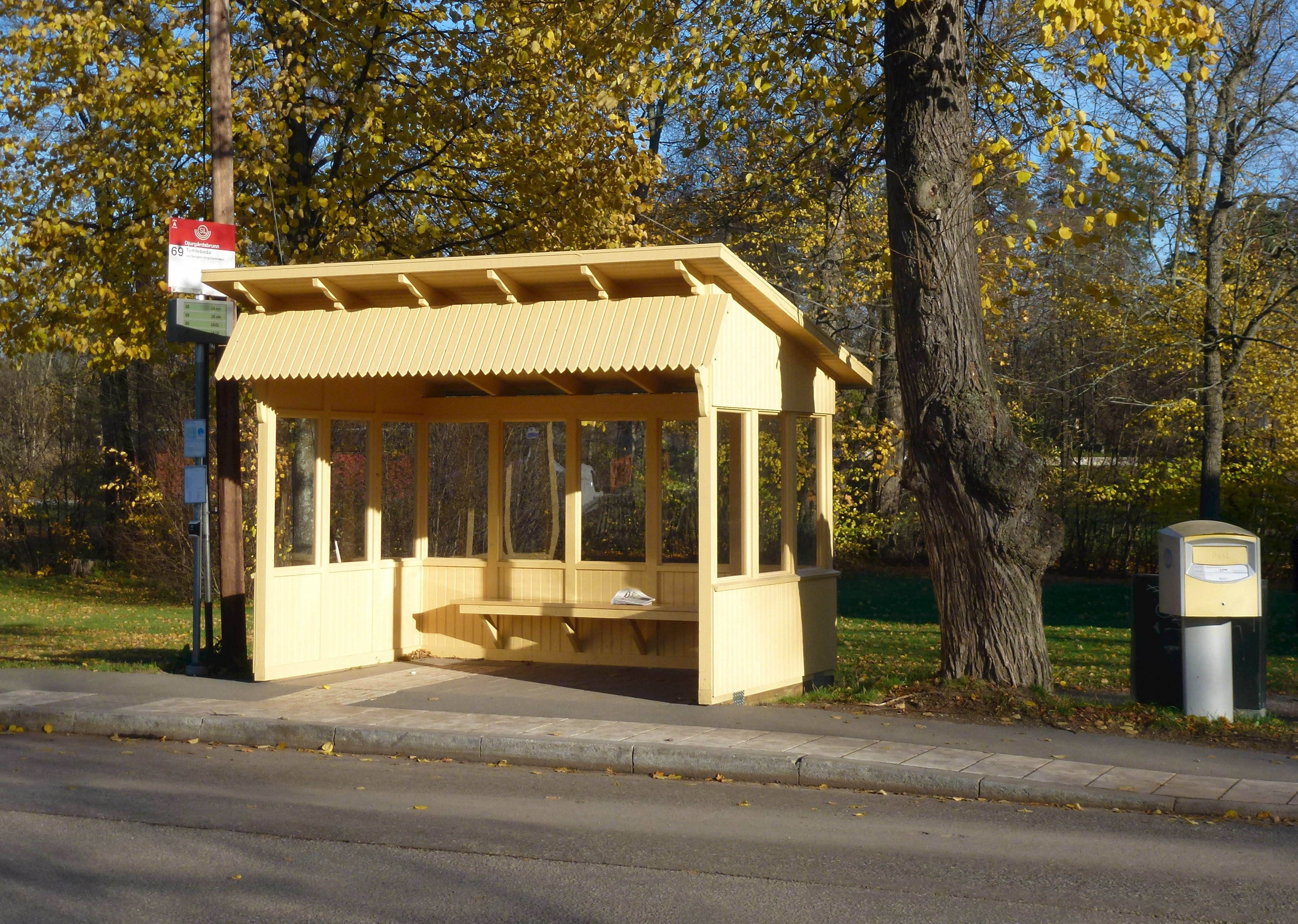 Holger Bloms busskur på Gärdet (hållplats Djurgårdsbrunn)